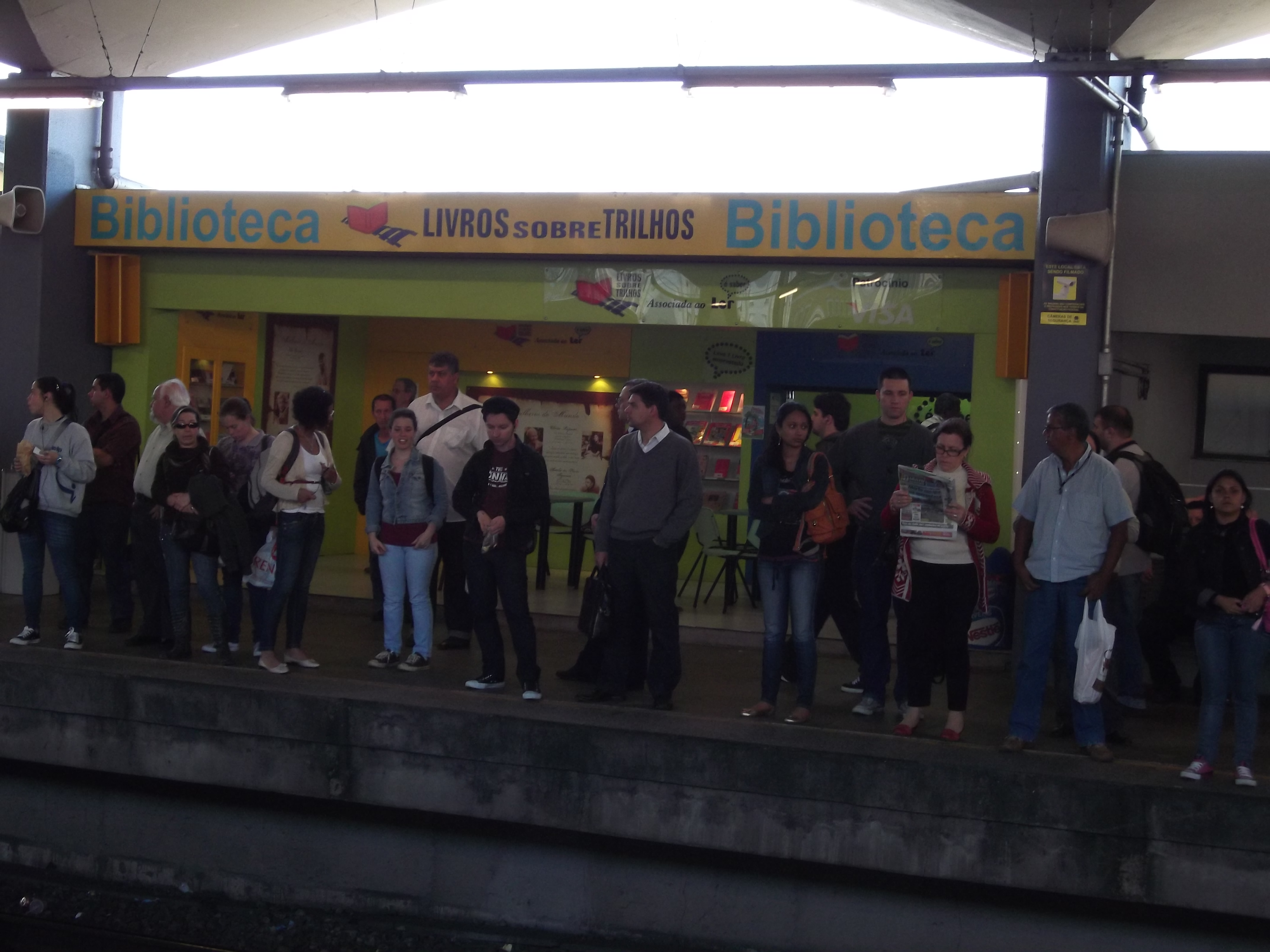 Biblioteca Livros Sobre Trilhos do Trensurb, Porto Alegre, Brasil